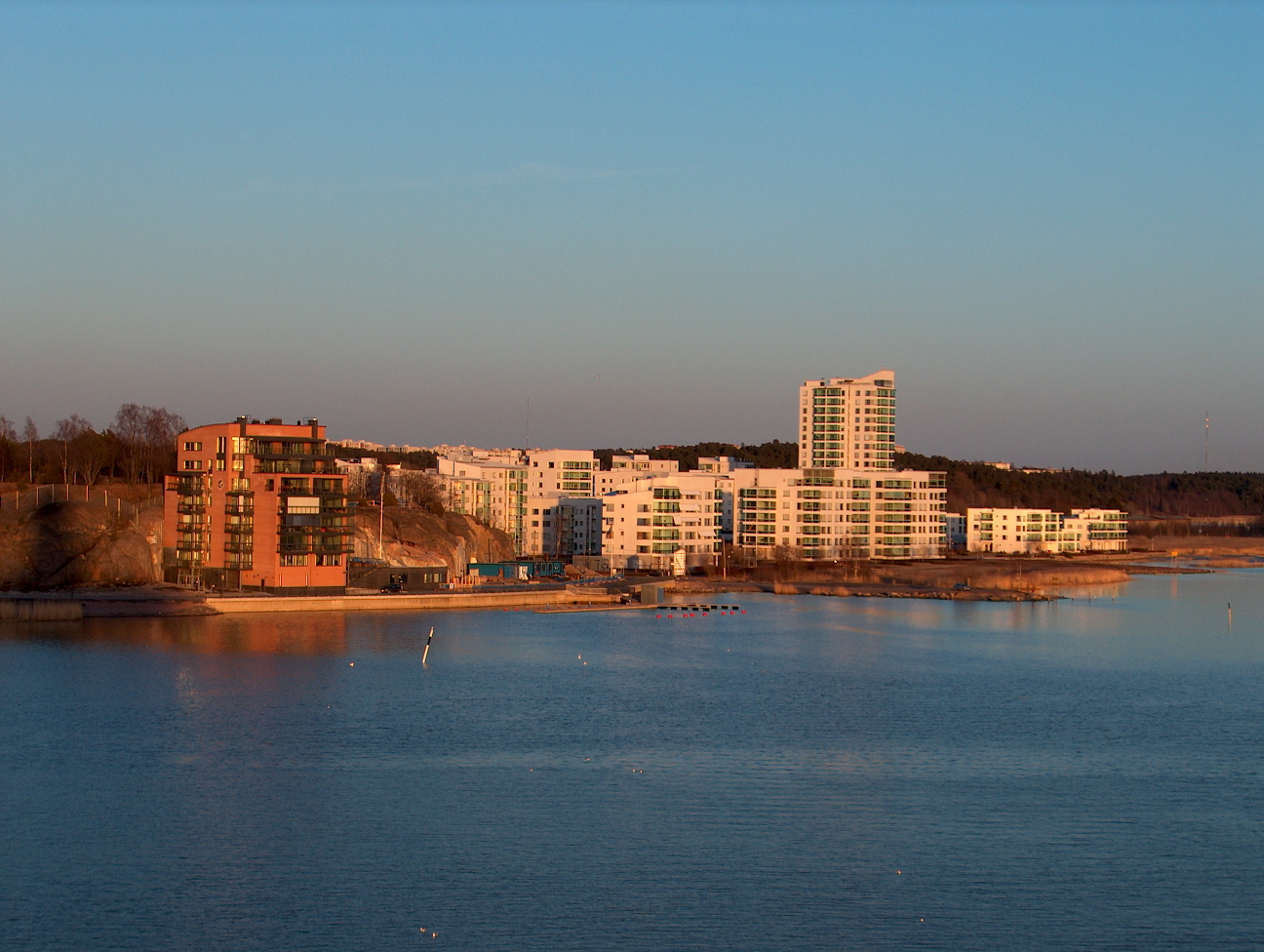 Majakkaranta, Turku, Finland, architect Frank Schauman, 1990–2005.